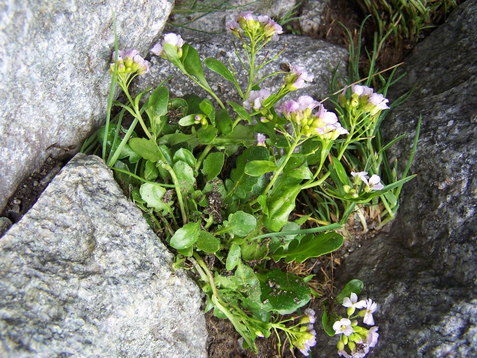 Arabis neglecta (pl. rzeżusznik tatrzański), habitat: Tatra Mountains, Orla Perć, Kozia Przełęcz)